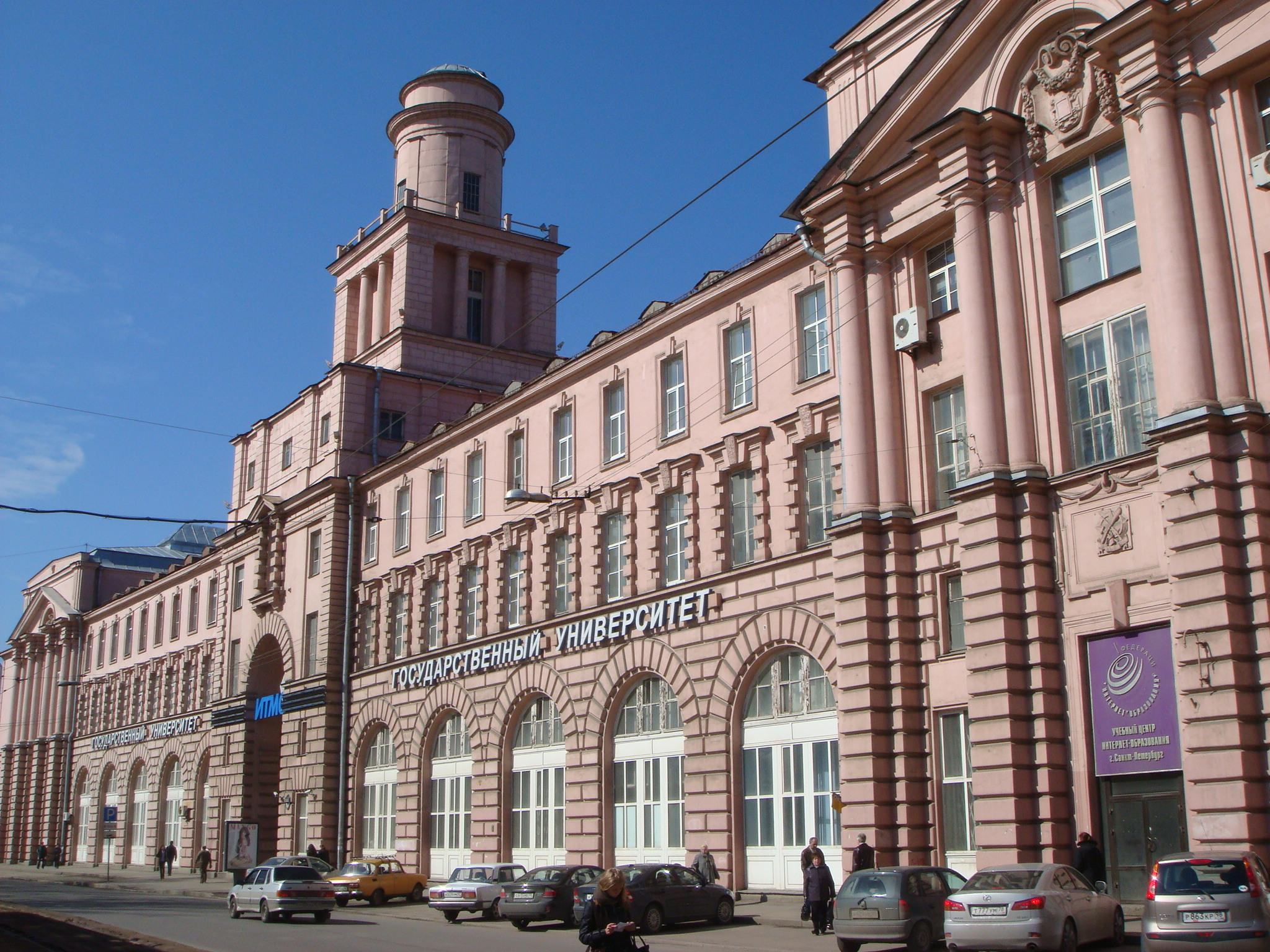 Главное здание Университета ИТМО